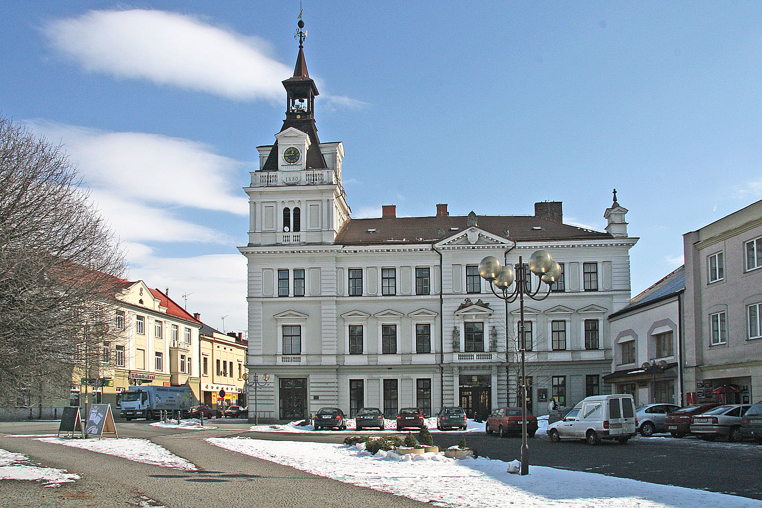 Česky: Choceň, náměstí Tyršovo. - OpenStreetMap(Info)